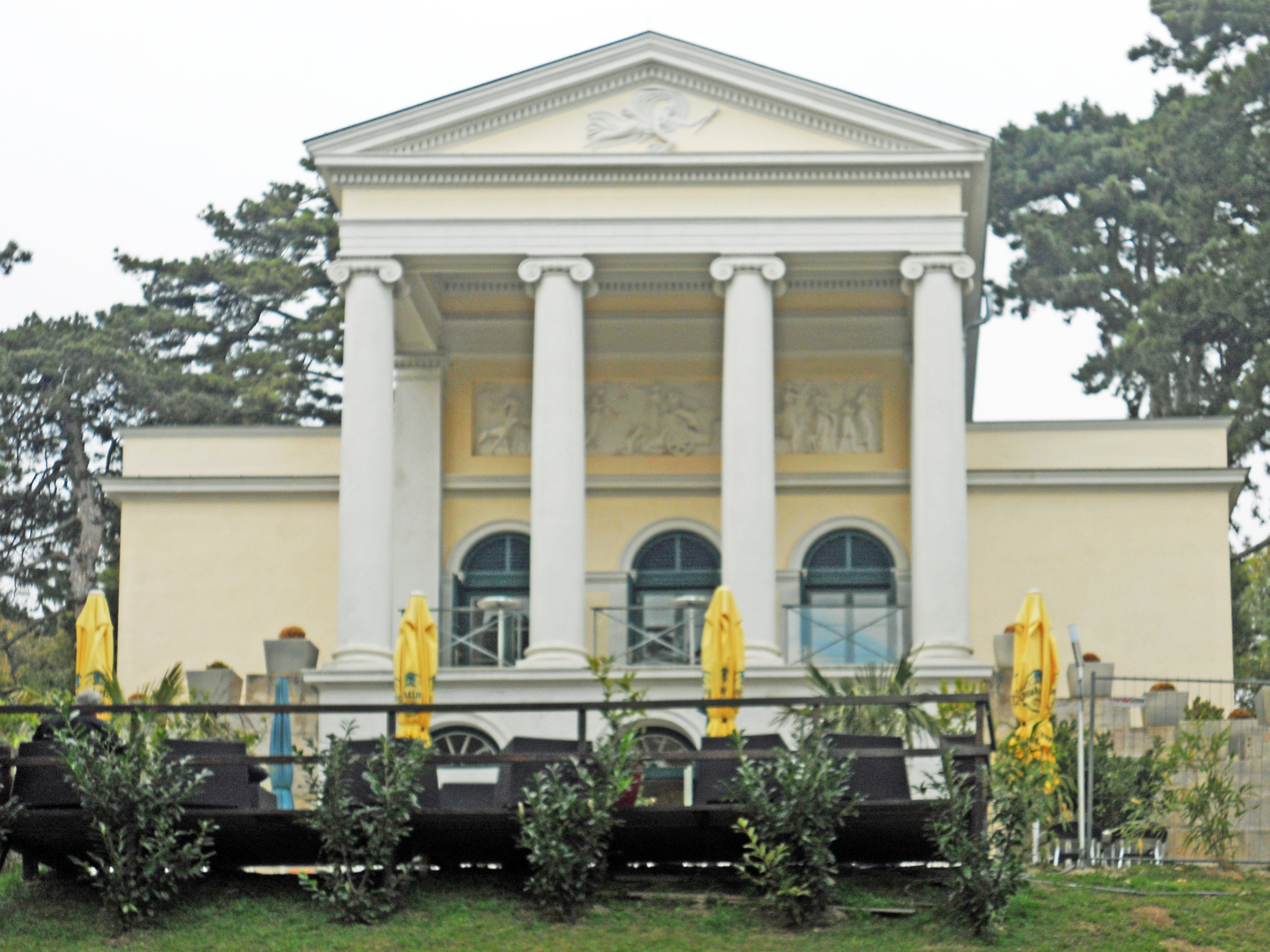 Schloss, Gloriette